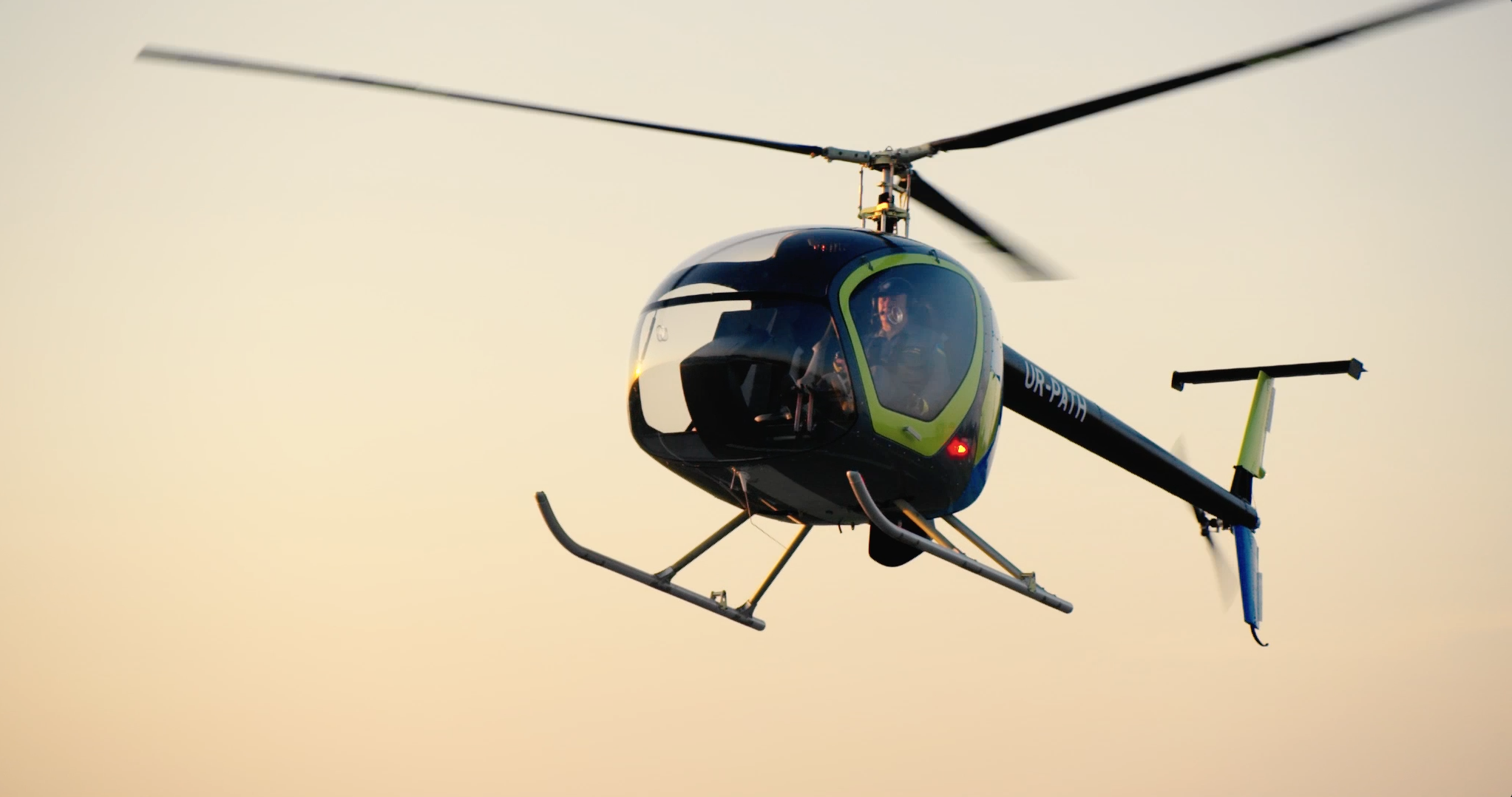 Вертолет SCOUT в полете